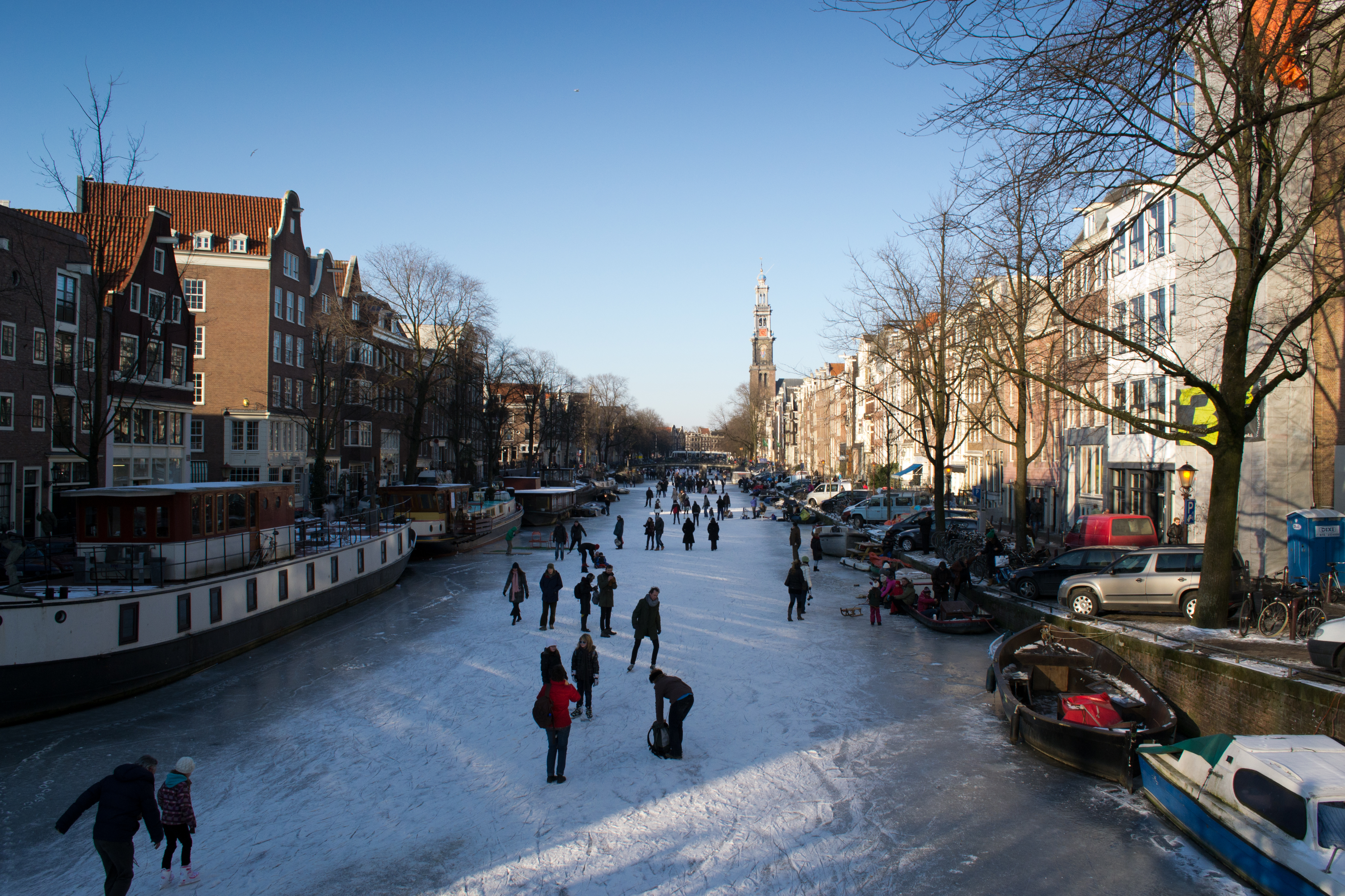 De Prinsengracht in Amsterdam in de winter, met uitzicht op de Westertoren.